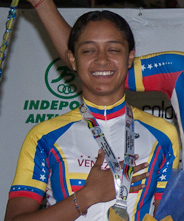 El podio de la velocidad por equipos femenina Campeonato Panamericano de Ciclismo de Pista, Medellín. 2 de mayo de 2011.